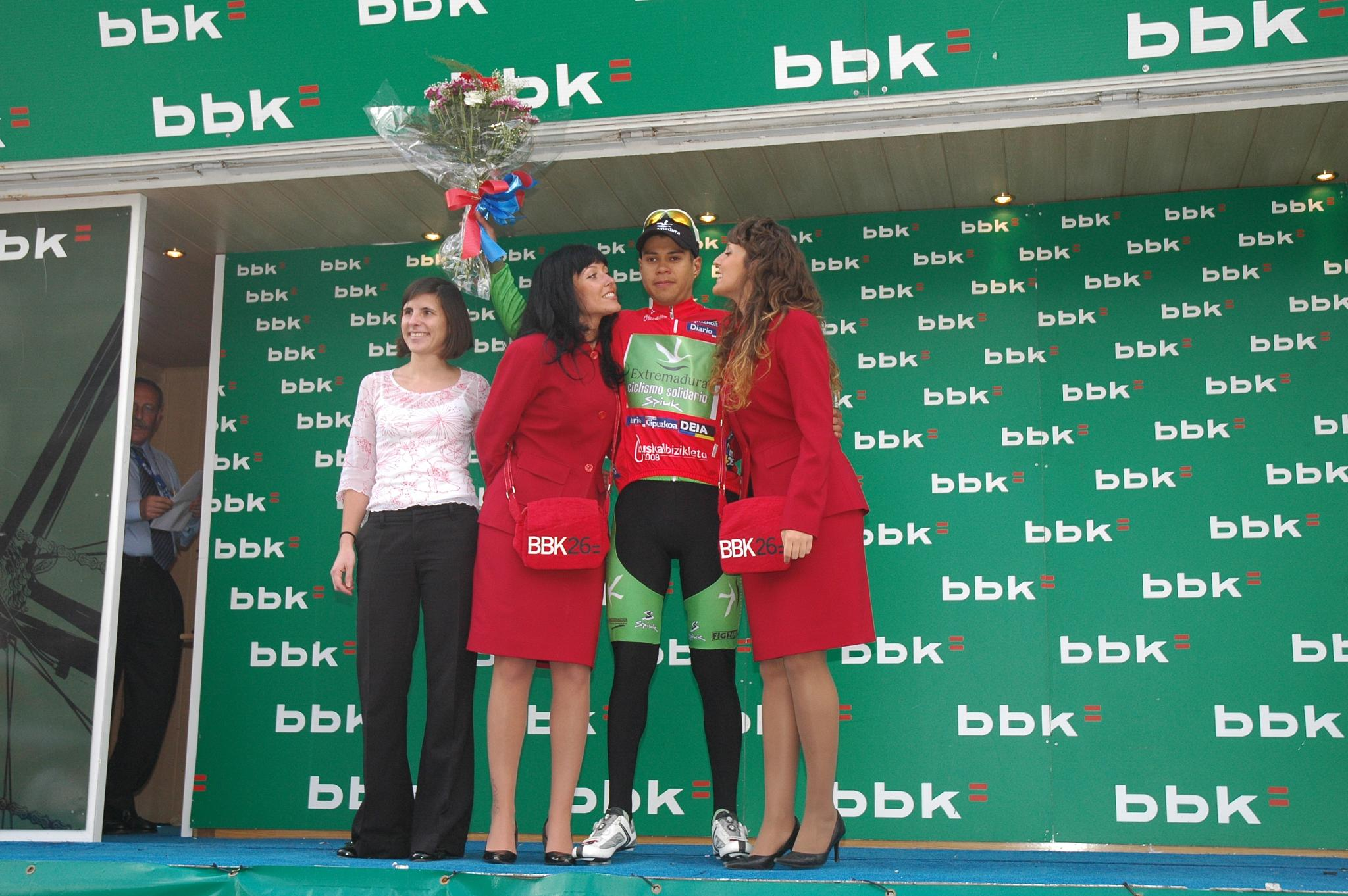 Ignacio SARABIA (EXTREMADURA) Lider de las Metas Volantes, Euskal Bizikleta 2008